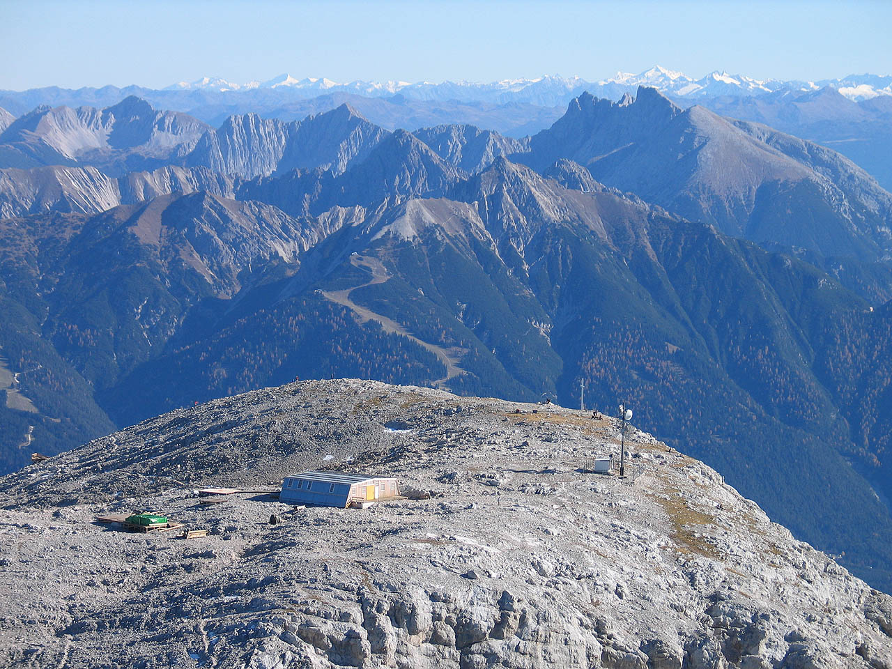 Ostgipfel (2592 m) der Hohen Munde dahinter Karwendel und Zentralalpen, Tirol, Österreich